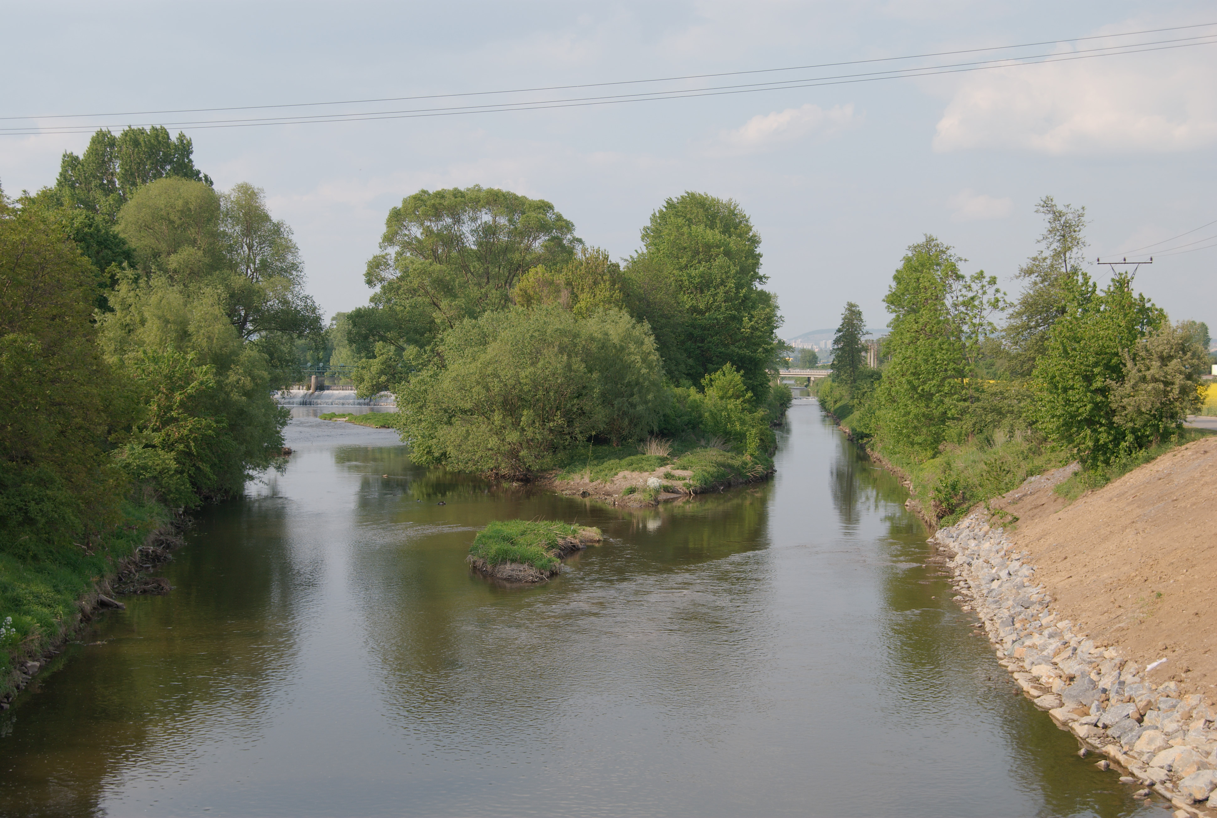 Soutok Svratky a Svitavy za obvyklých podmínek